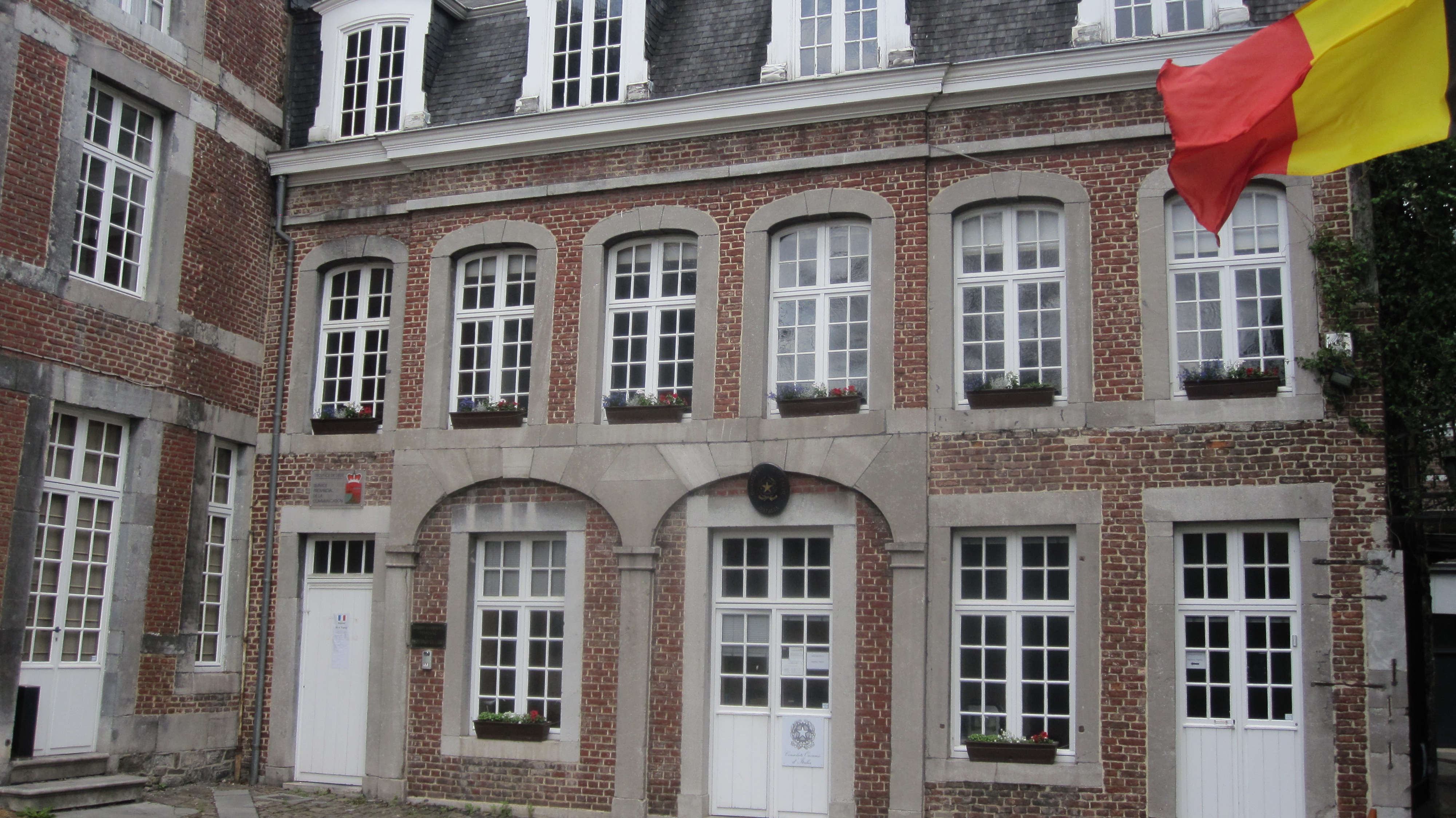 Liège en 2015